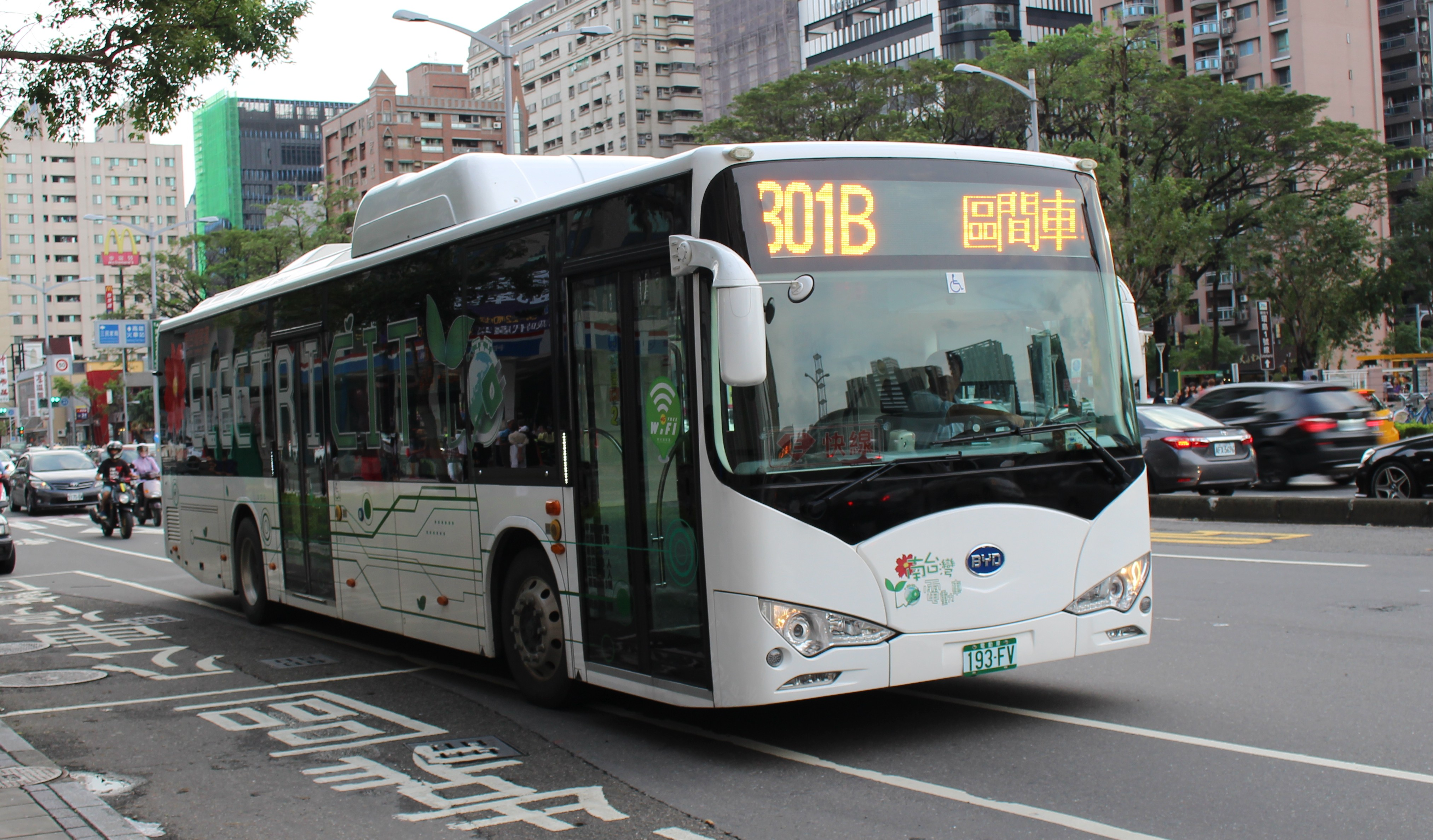 中文（台灣）: 南台灣客運凱勝綠能科技BYD K9電動公車193-FV。